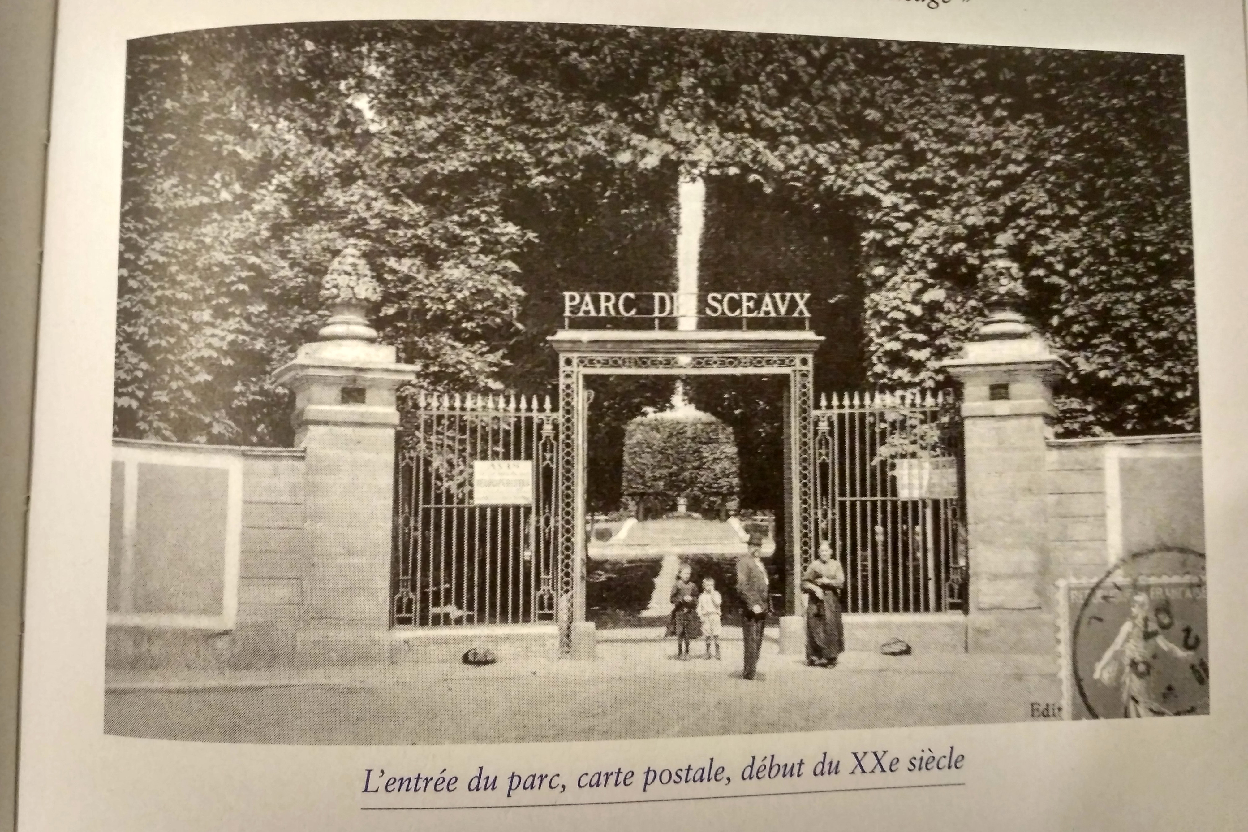 Carte postale, début XXe siècle, entrée du jardin de la ménagerie